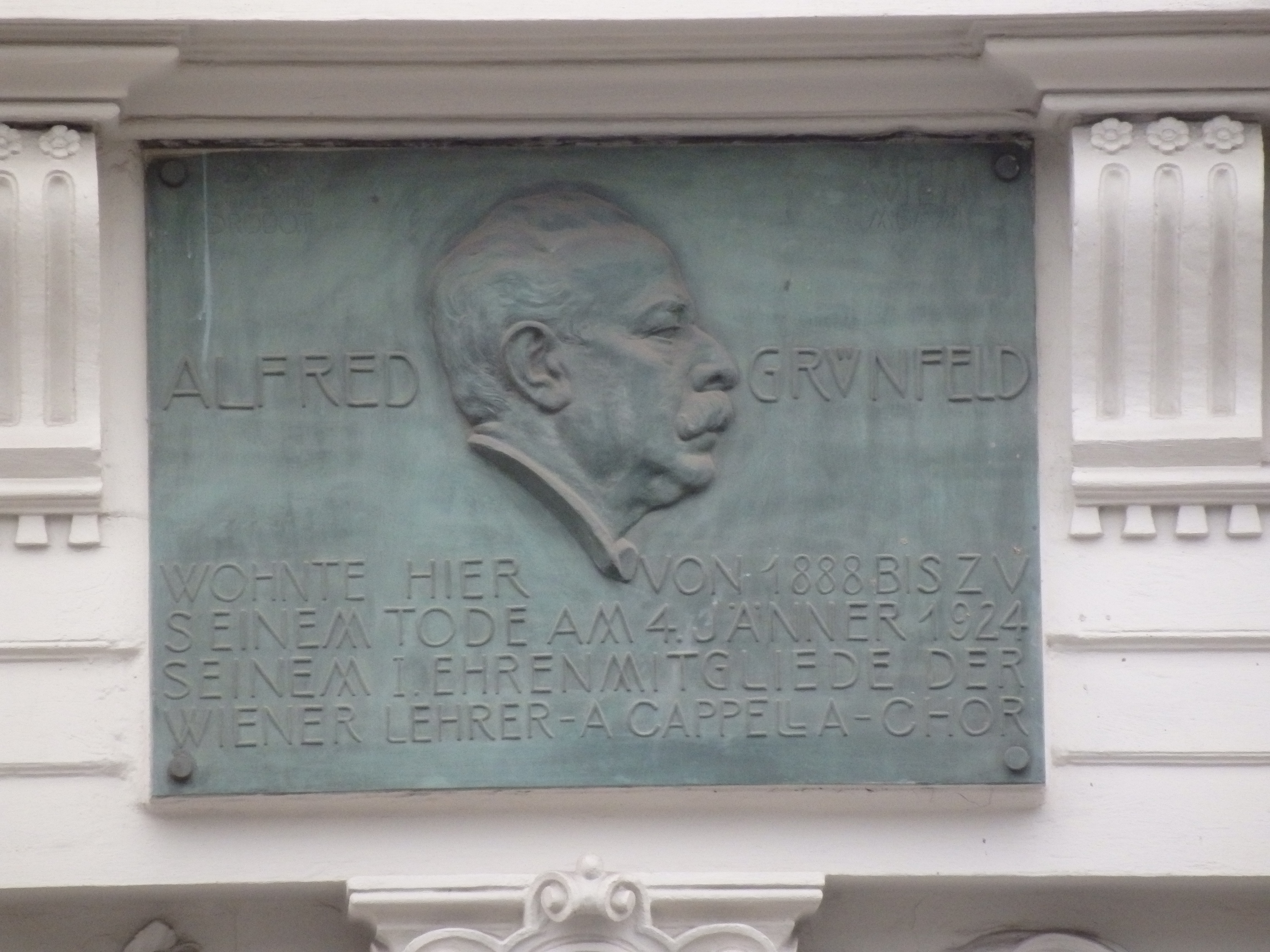 Gedenktafel Alfred Grünfeld, Getreidemarkt 10, Wien-Innere Stadt